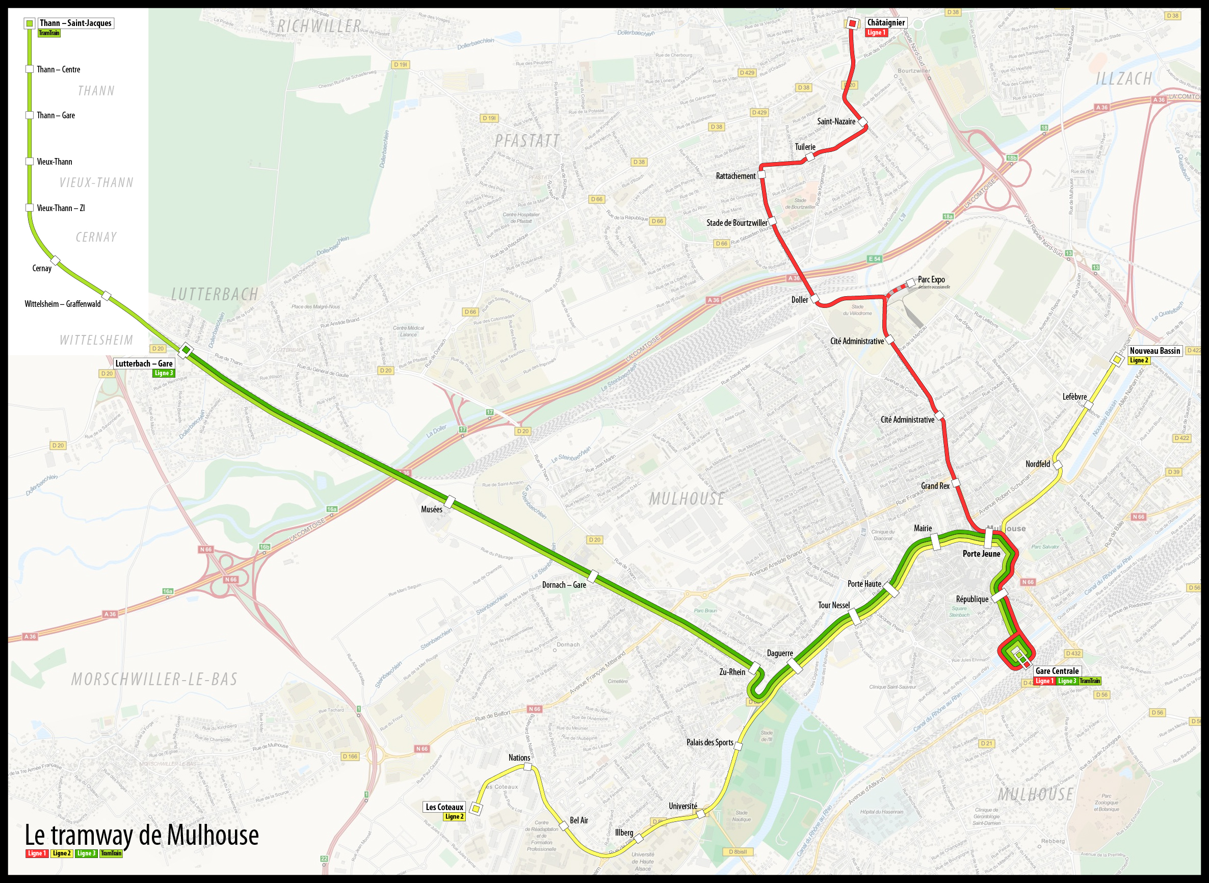 Carte du réseau de tramway de Mulhouse et du Tram-train Mulhouse-Vallée de la Thur au-delà de Lutterbach, Alsace, France. Utilisant les cartes d'OpenStreetMap.